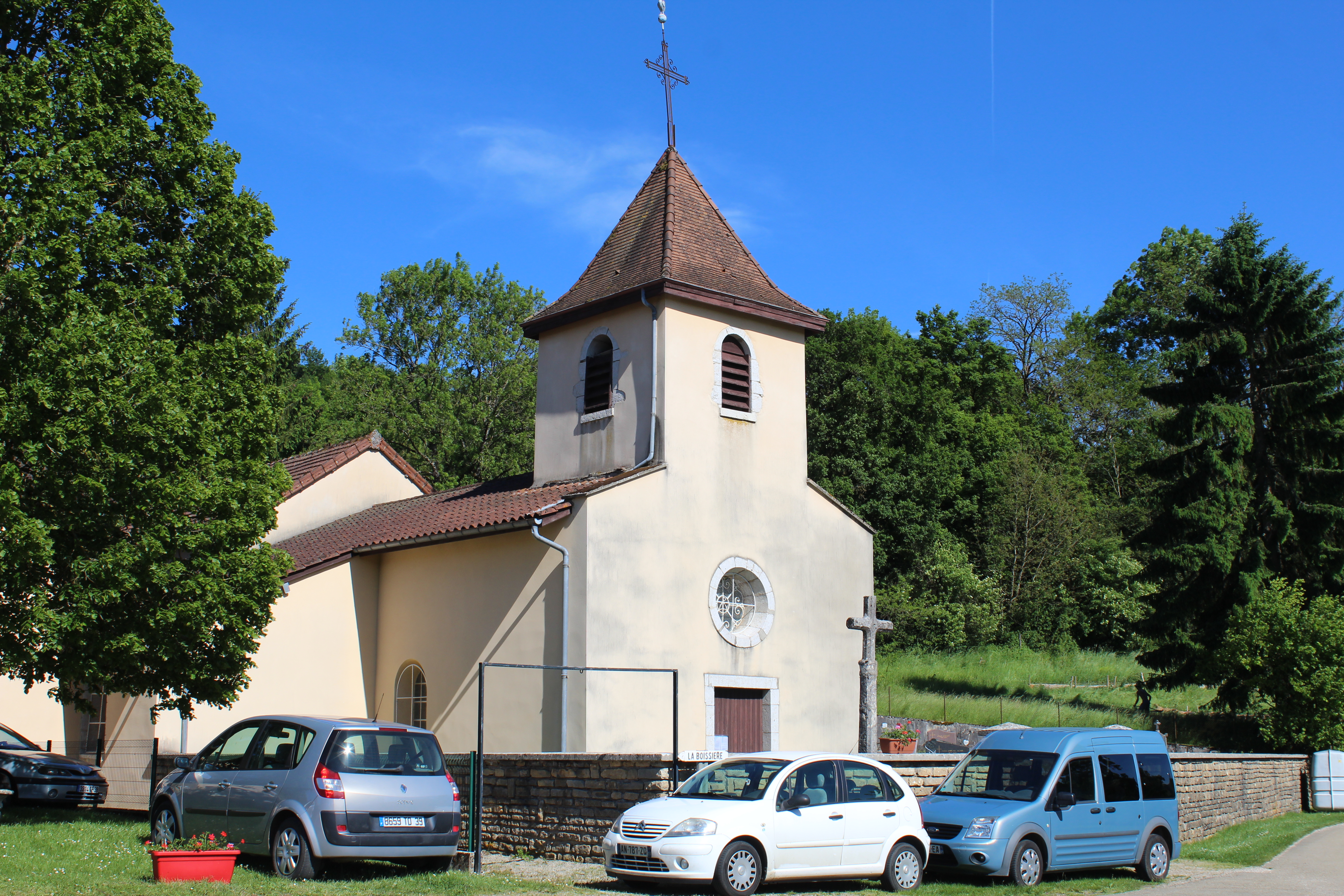 Église Saint-Gengulphe de Bourcia.